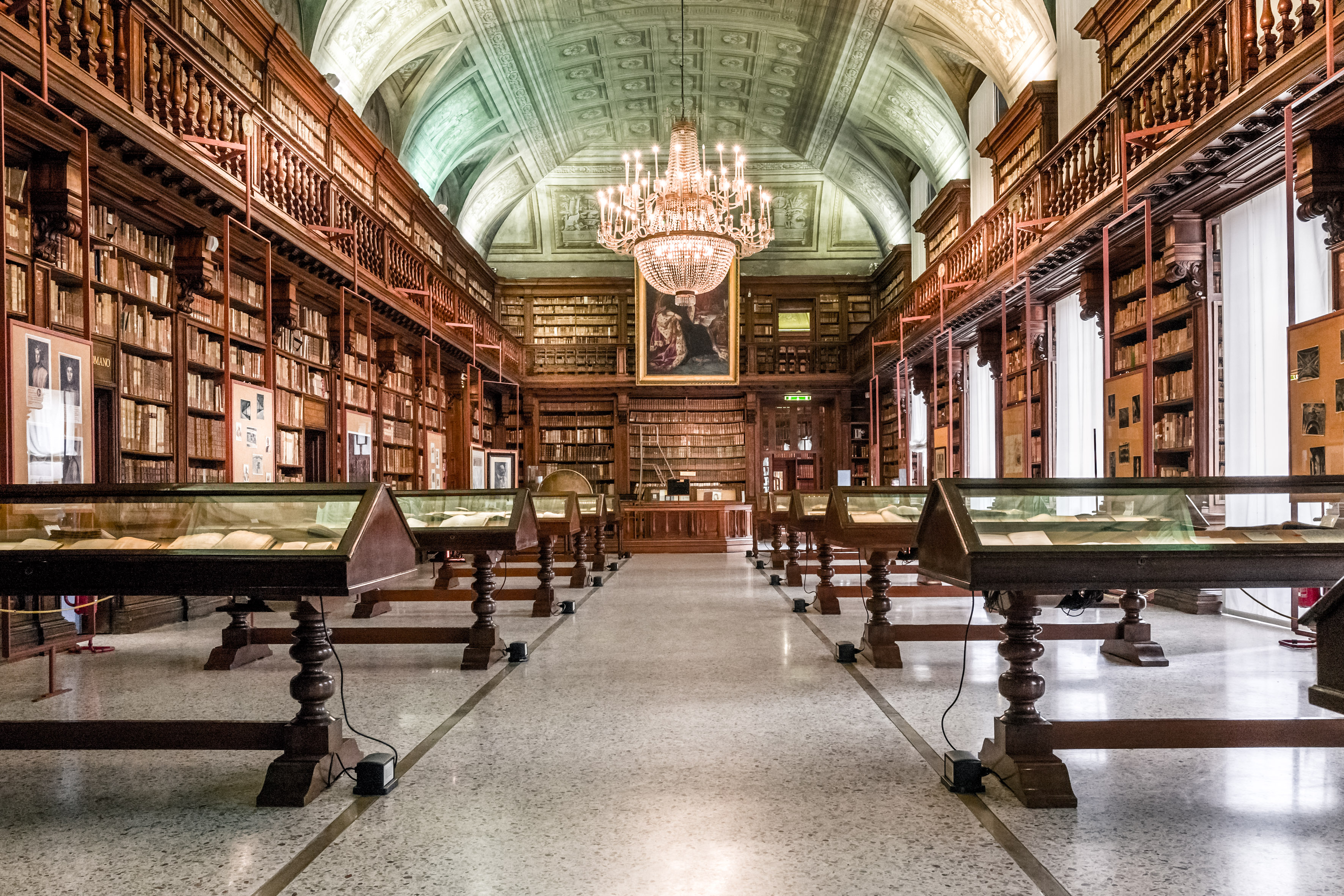 Sala Maria Teresa - Foto di - Creative Commons Attribuzione 3.0 Italia